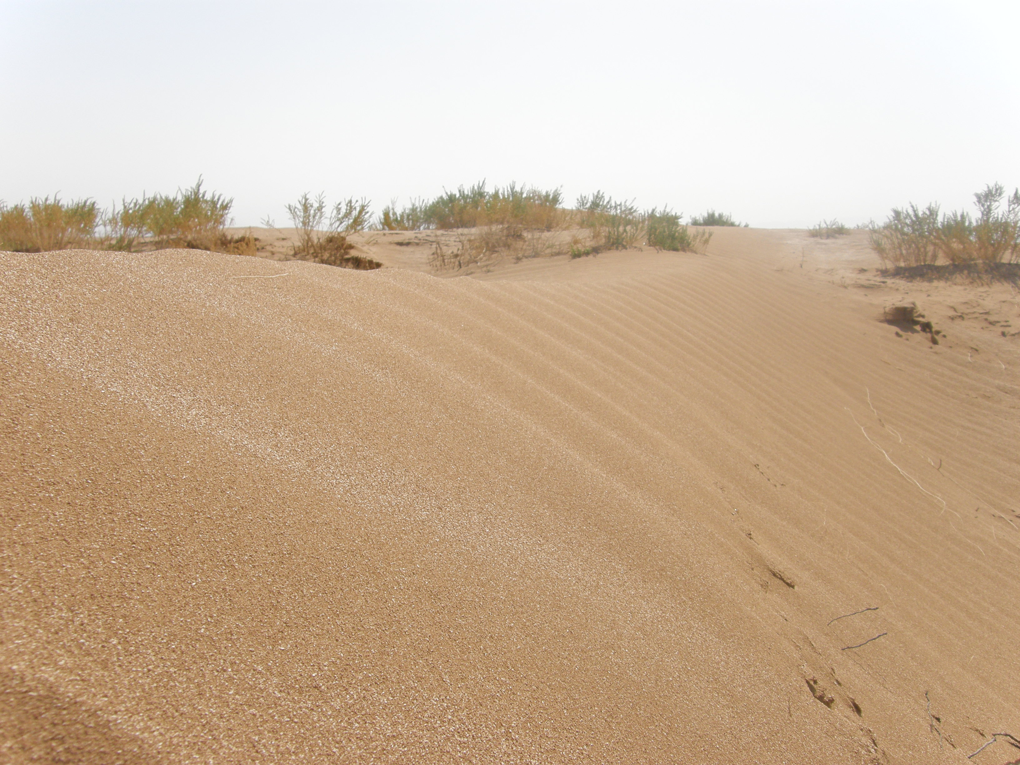 شن های روان کویر میقان